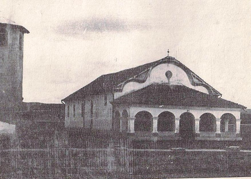 Черквата Свети Георги в село Шишманово